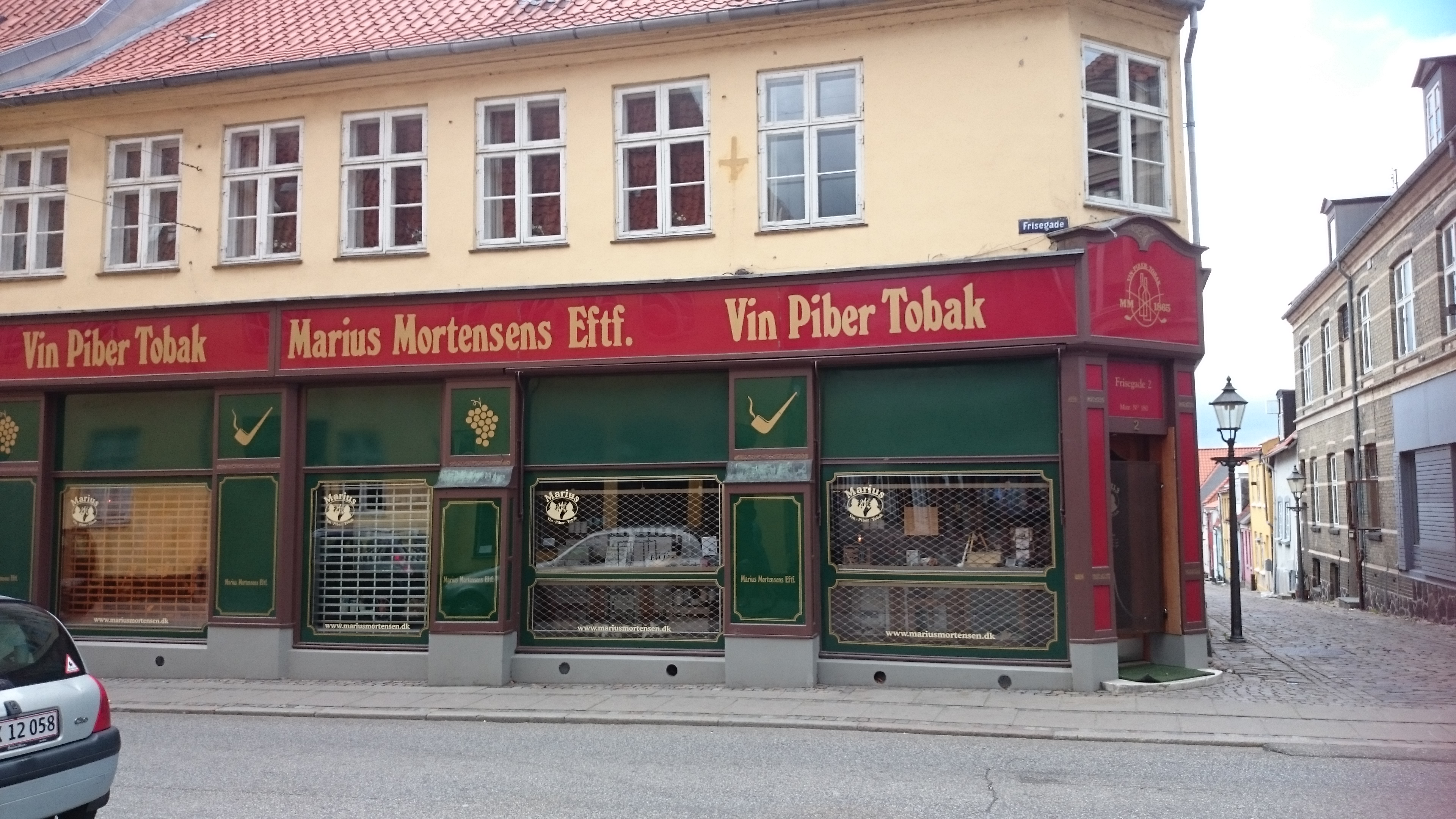 Danmarks ældste vinhandel, grundlagt i 1866.